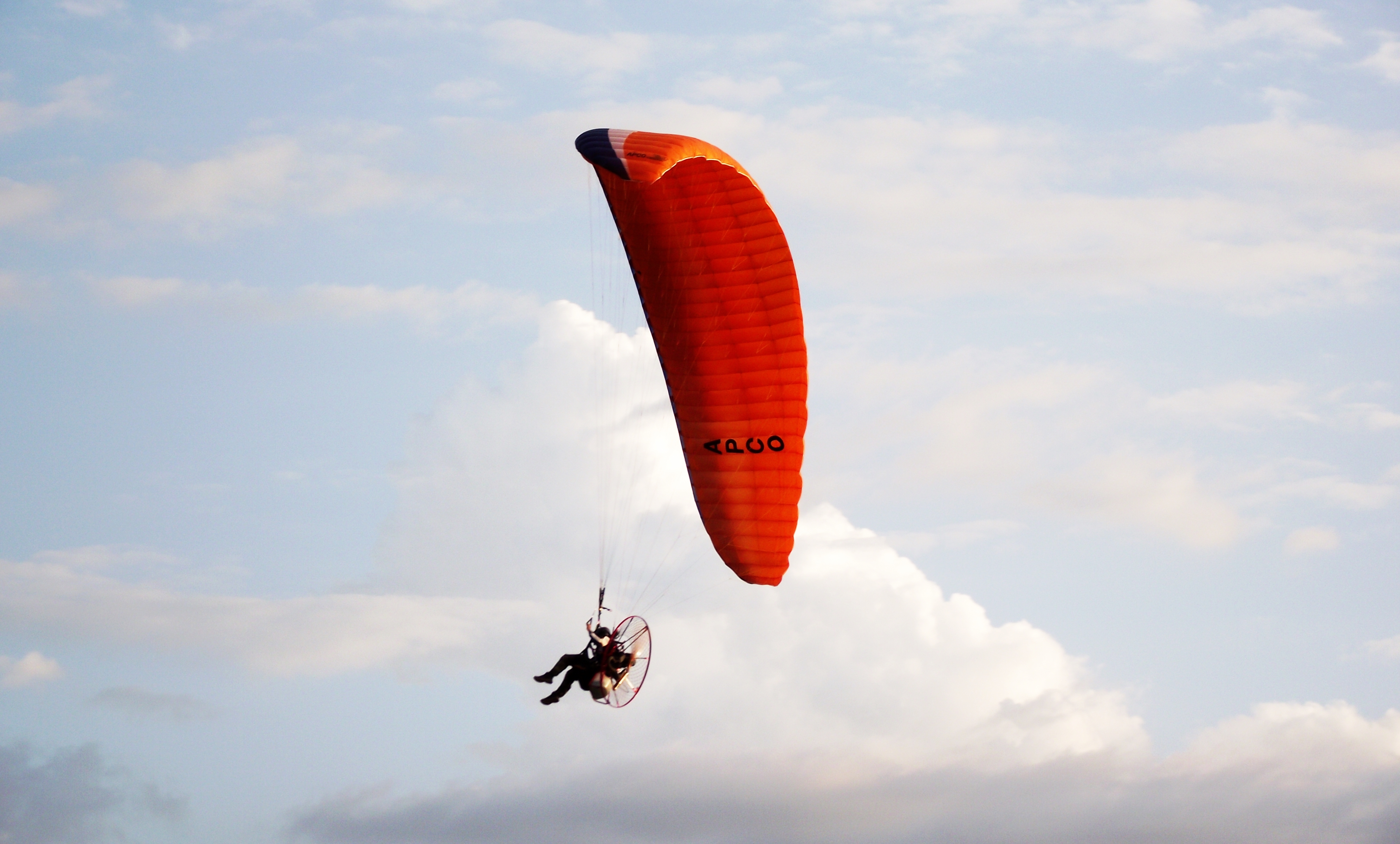 Português do Brasil: Imperatrizense pratica voo motorizado em parapente nos céus de Imperatriz (MA).